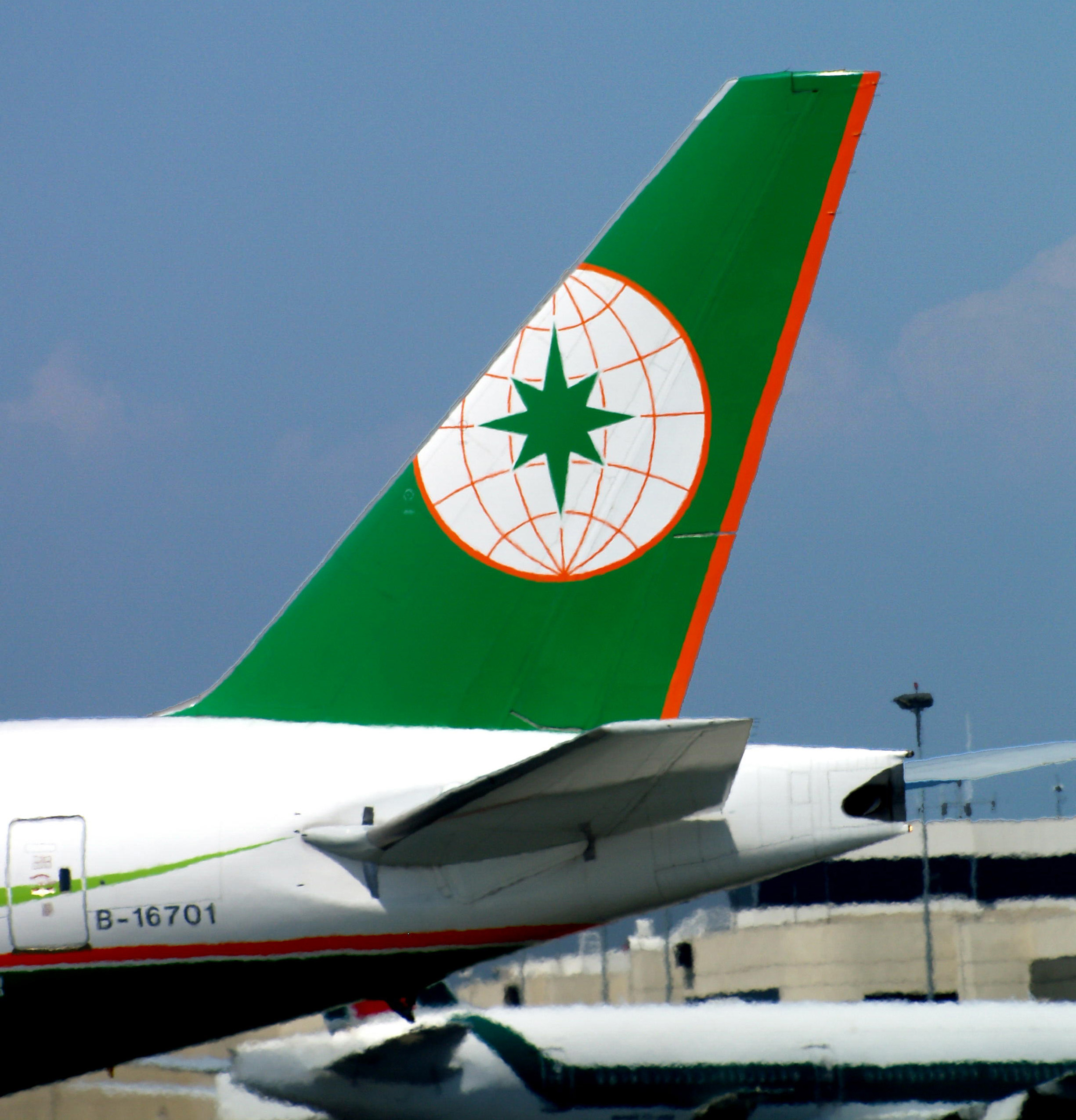 EVA Air 777